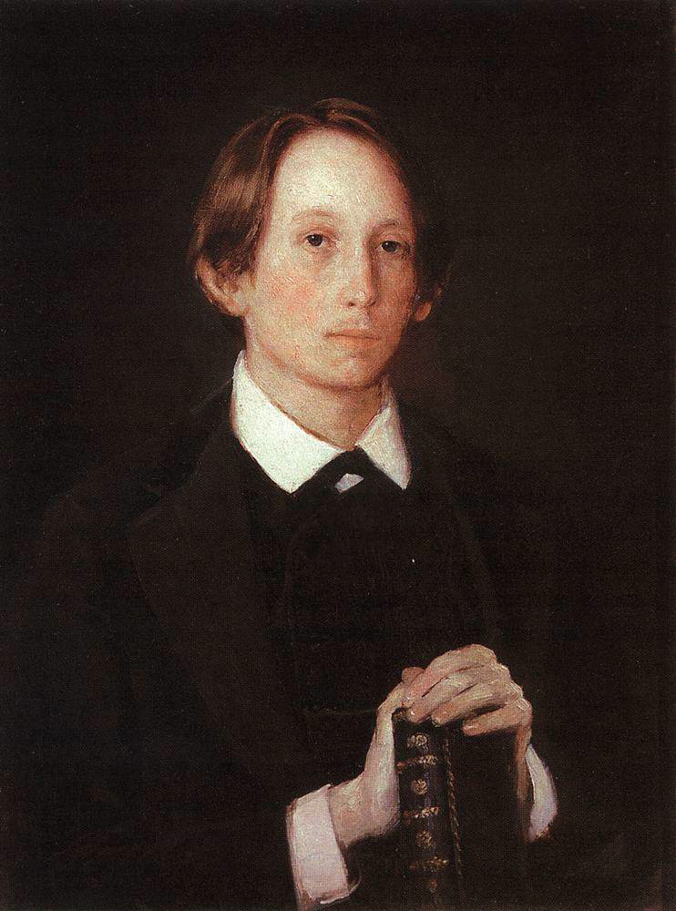 Портрет художника А.М. Васнецова